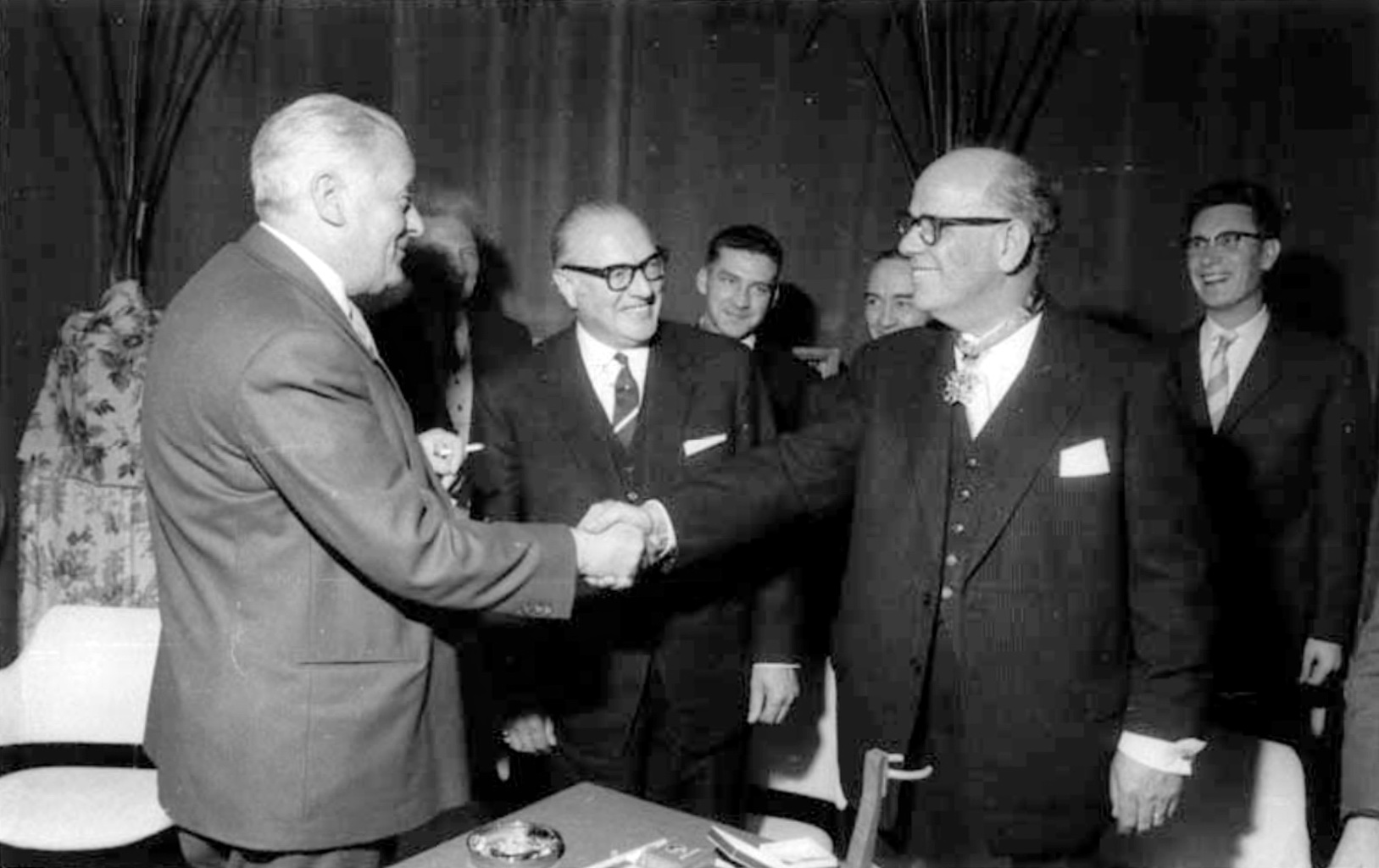 Directeur Van Eyseren van de Maastrichtse Spijker- en Draadnagelfabriek v/h Thomas Regout ontvangt een koninklijke onderscheiding in april 1960. Links wethouder Pieters van de gemeente Maastricht. Een jaar eerder had het bedrijf zijn 125-jarig bestaan gevierd. Fotocollectie RHCL Maastricht, GAM 5738.